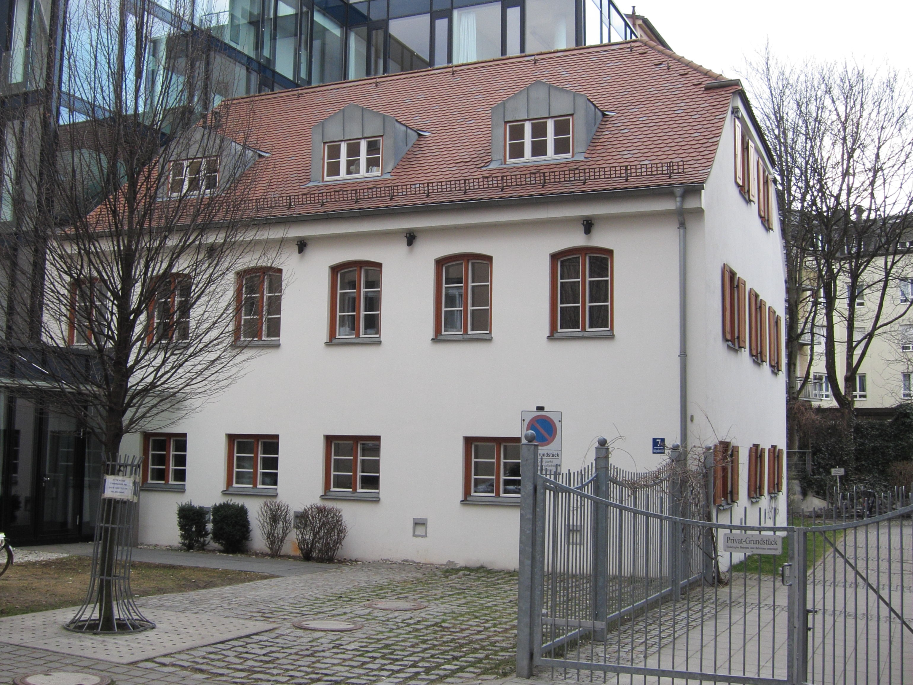 Adelgundenstraße 7; Kleinhaus mit Schopfwalm, biedermeierlich, 1. Hälfte 19. Jh., Sanierung 2001.